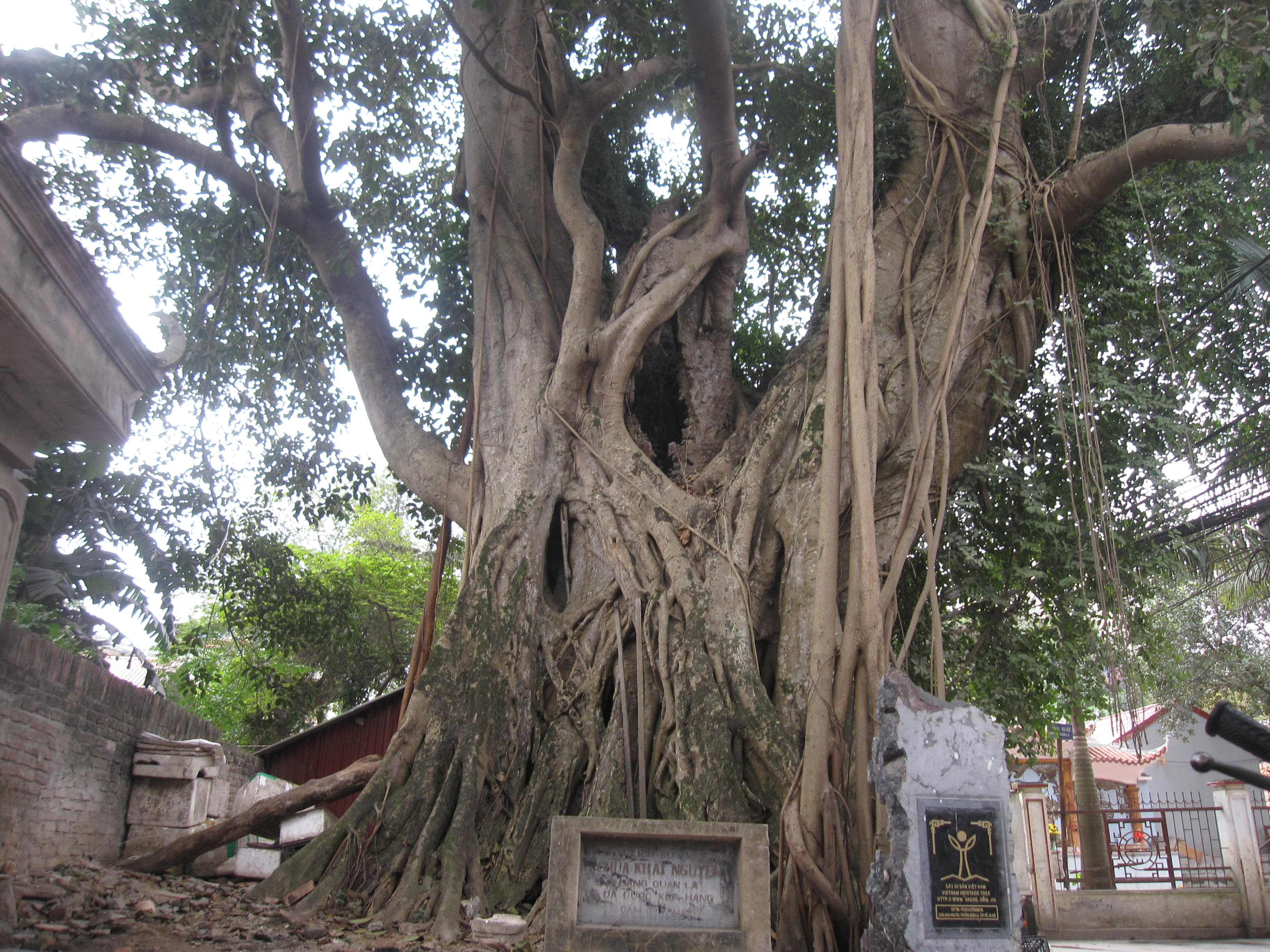 Cây đa di sản bên chùa Khai Nguyên, phường Xuân La, quận Tây Hồ, Hà Nội, Việt Nam